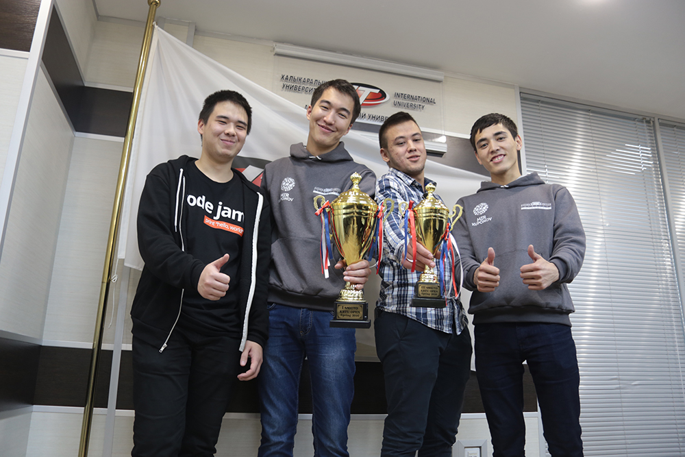 Фото чемпионов ACM ICPC Kazakhstan 2015